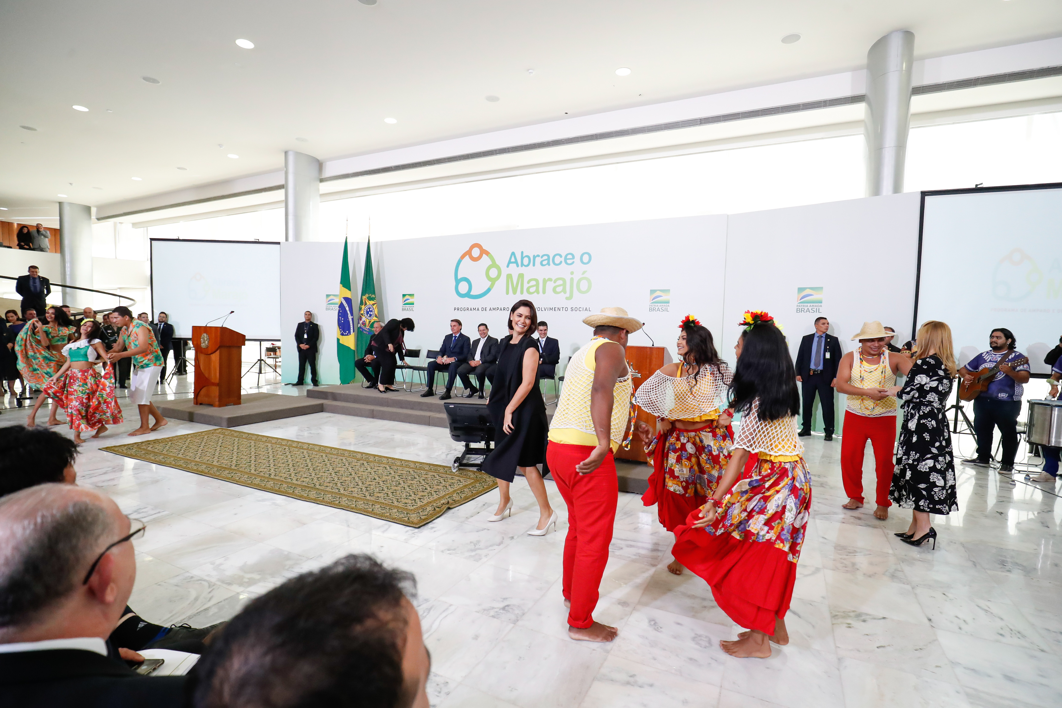 (Brasília - DF, 03/03/2020) Apresentação do Grupo Folclórico Boa Vista da música e dança do Carimbó.